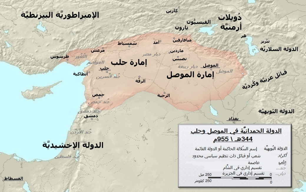 خارطة تُبيِّن حُدود الدولة الحمدانيَّة في الموصل وحلب سنة 344هـ المُوافقة لِسنة 955م.